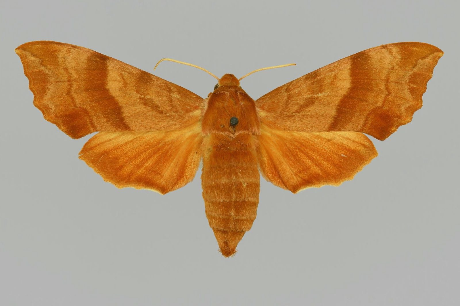 Clarina syriaca, female, upperside. Lebanon